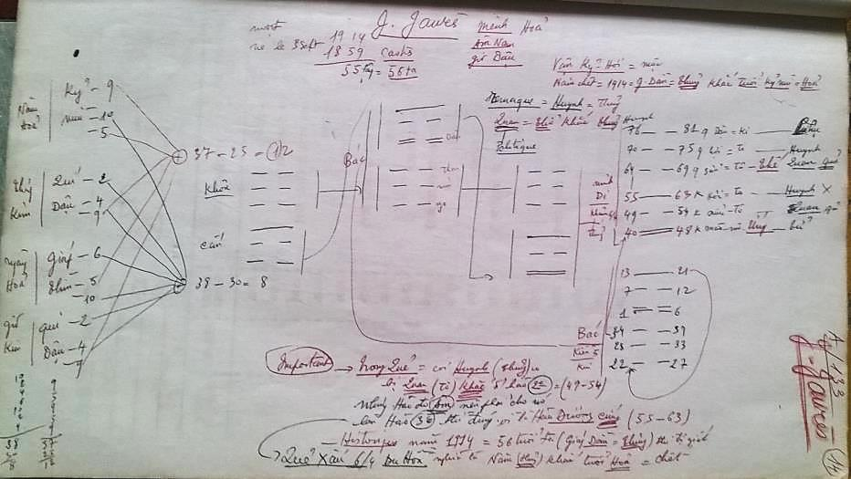 HLJaures